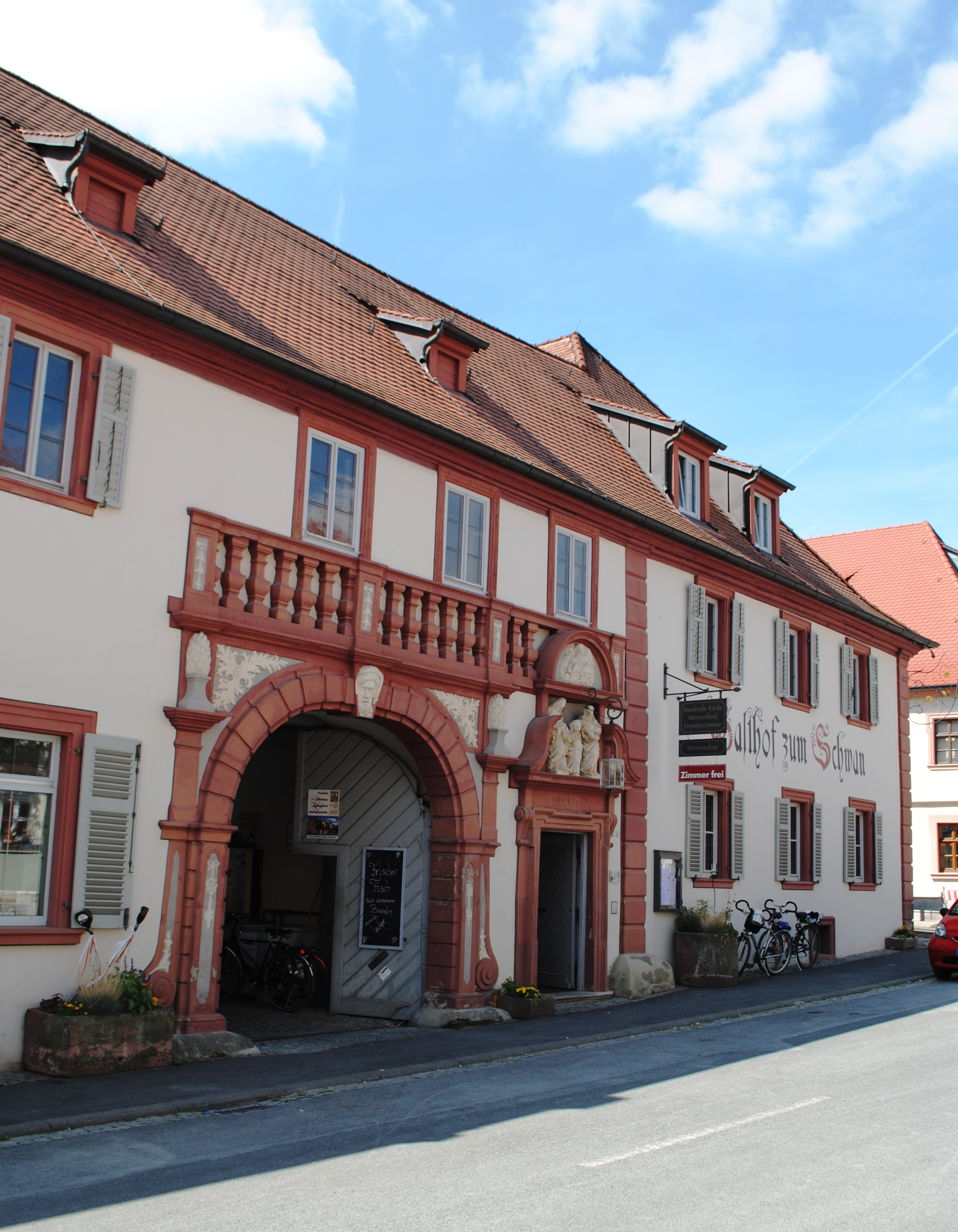 Gasthof zum Schwan, Hauptstraße, SommerachThis is a photograph of an architectural monument.